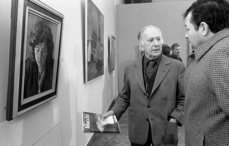 Berlin, Ausstellung Gabriele Mucchi ADN-ZB/Senft/26.1.83/Berlin: Eine Ausstellung des italienischen Malers und Grafikers Gabriele Mucchi (M.) wurde in Anwesenheit des Künstlers im Alten Museum eröffnet. Zu sehen sind 150 ausgewählte Werke. Zu den 90 Gemälden gehört das "Porträt der Reisarbeiterin Ada" von 1954. Abgebildete Personen: Mucchi, Gabriele: Maler, Graphiker, Journalist, Italien